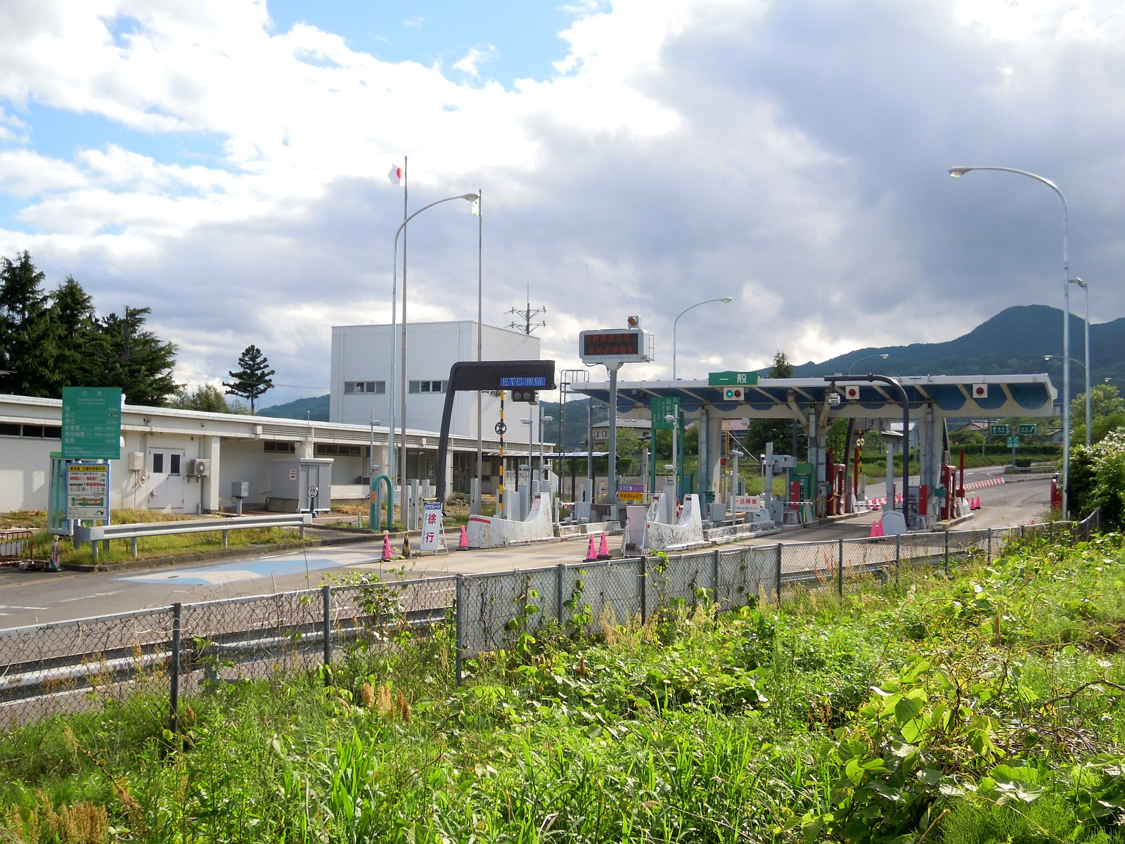 福島県伊達郡国見町にある東北自動車道国見インターチェンジ料金所を一般道側から。